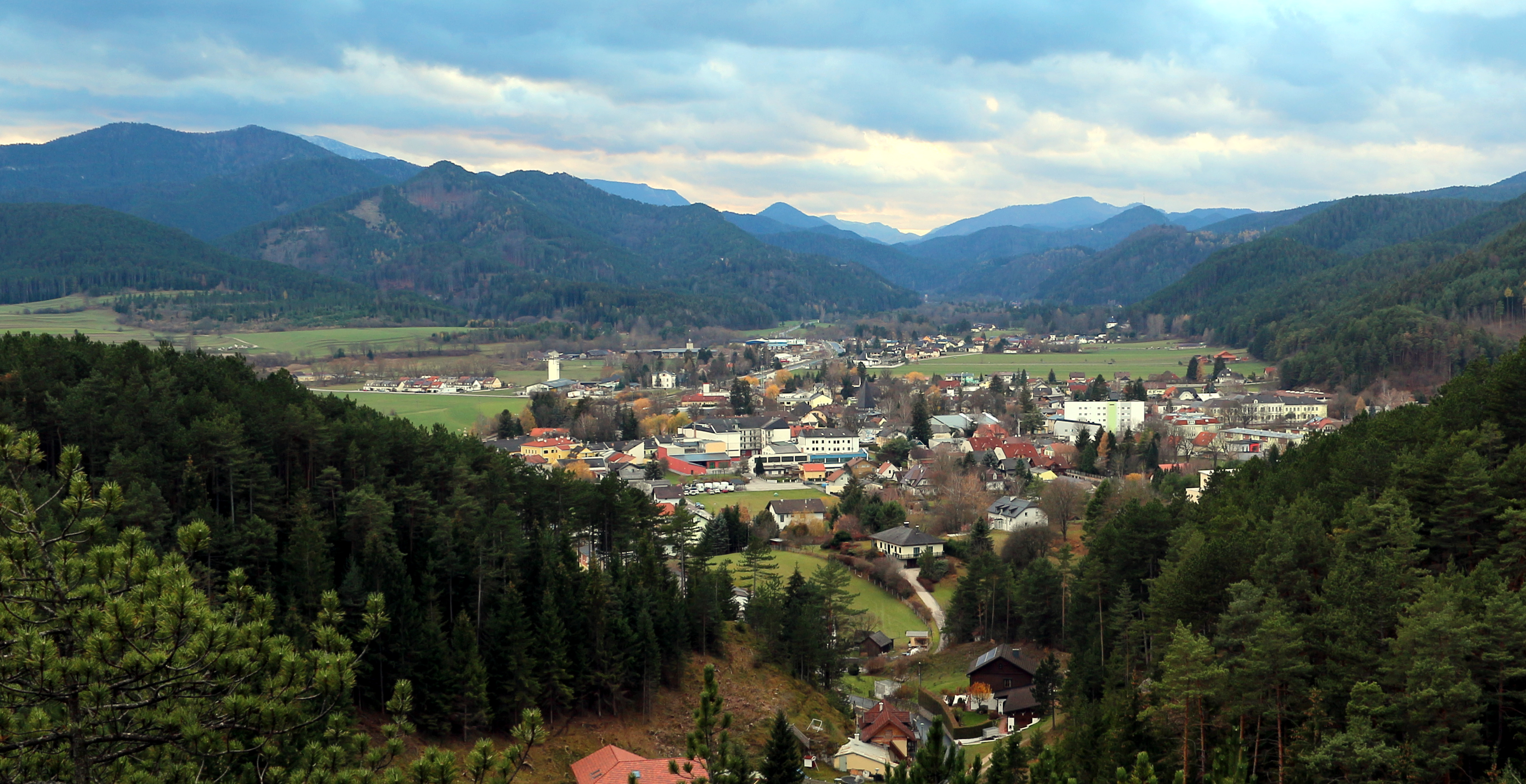 Pernitz gesehen vom Luckerten Stein (Blickrichtung Südwesten).